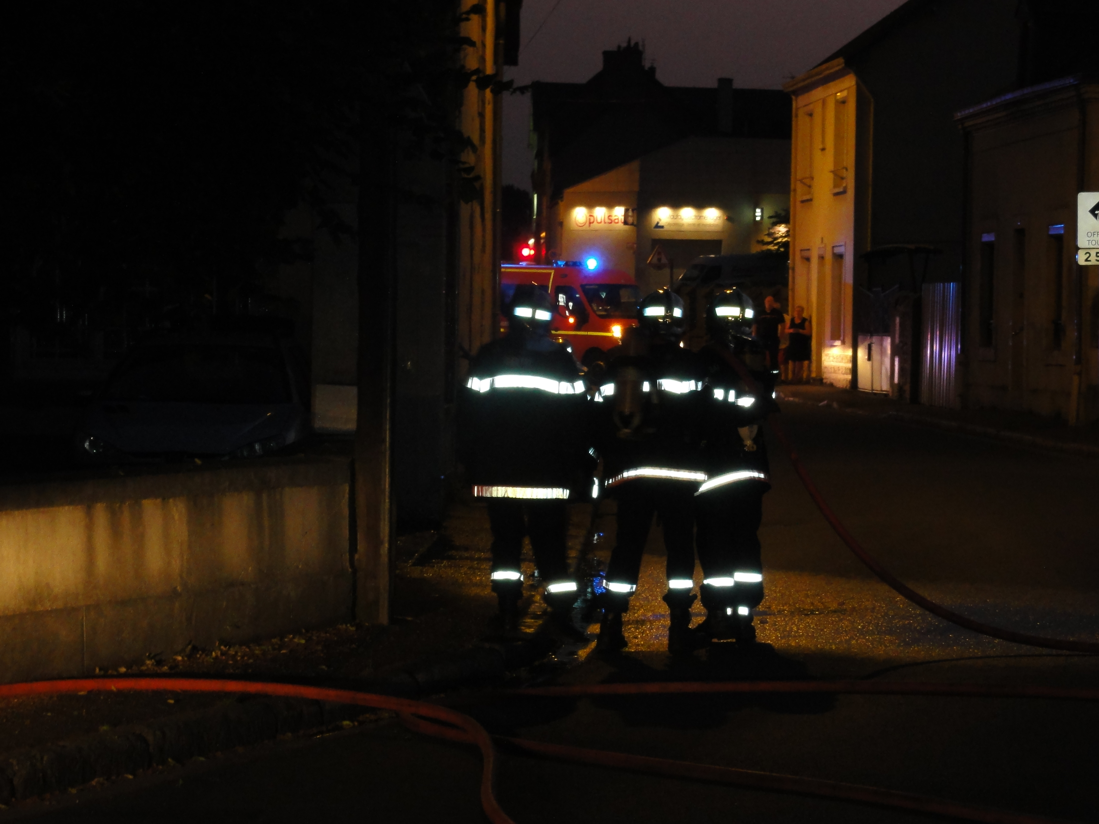 Beaumont-sur-Sarthe (Sarthe) Firefighting equipment, visibility by night